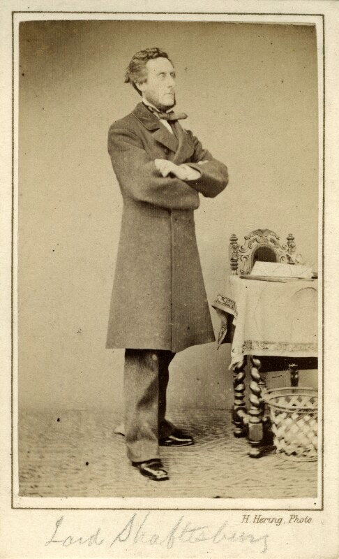 Photograph by Henry Hering